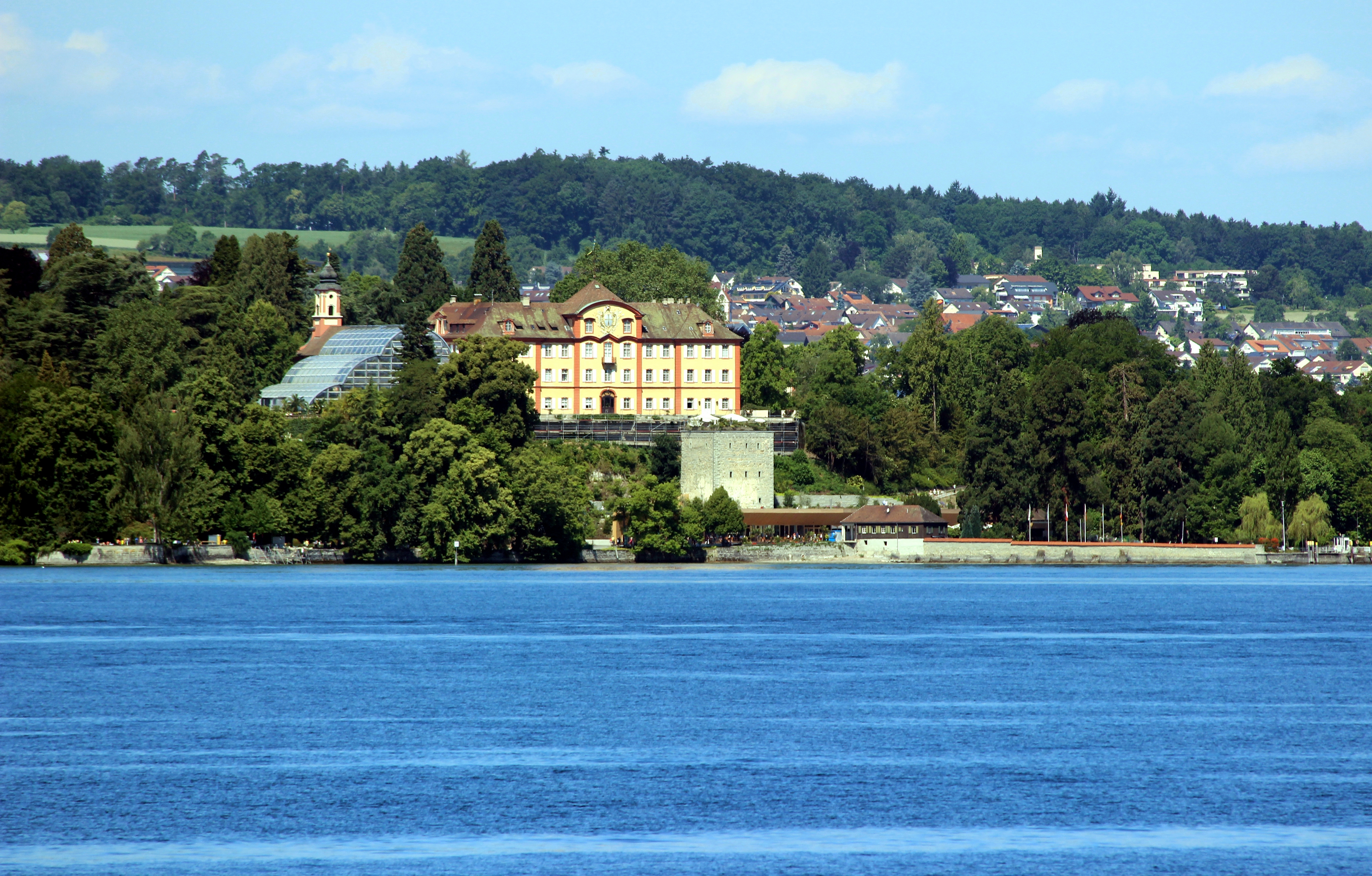 Blick auf die Insel Mainau (Konstanz) mit dem Deutschordenschloss bzw Schloss Mainau über dem Bodensee